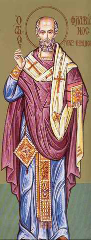 Патриарх Флавиан, византийская икона